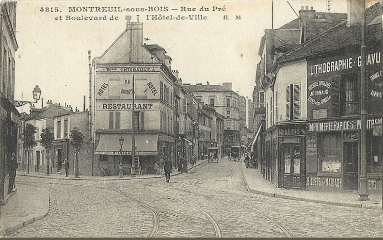 Le boulevard de l'Hôtel-de-Ville au croisement de la rue du Pré, à Montreuil-sous-Bois